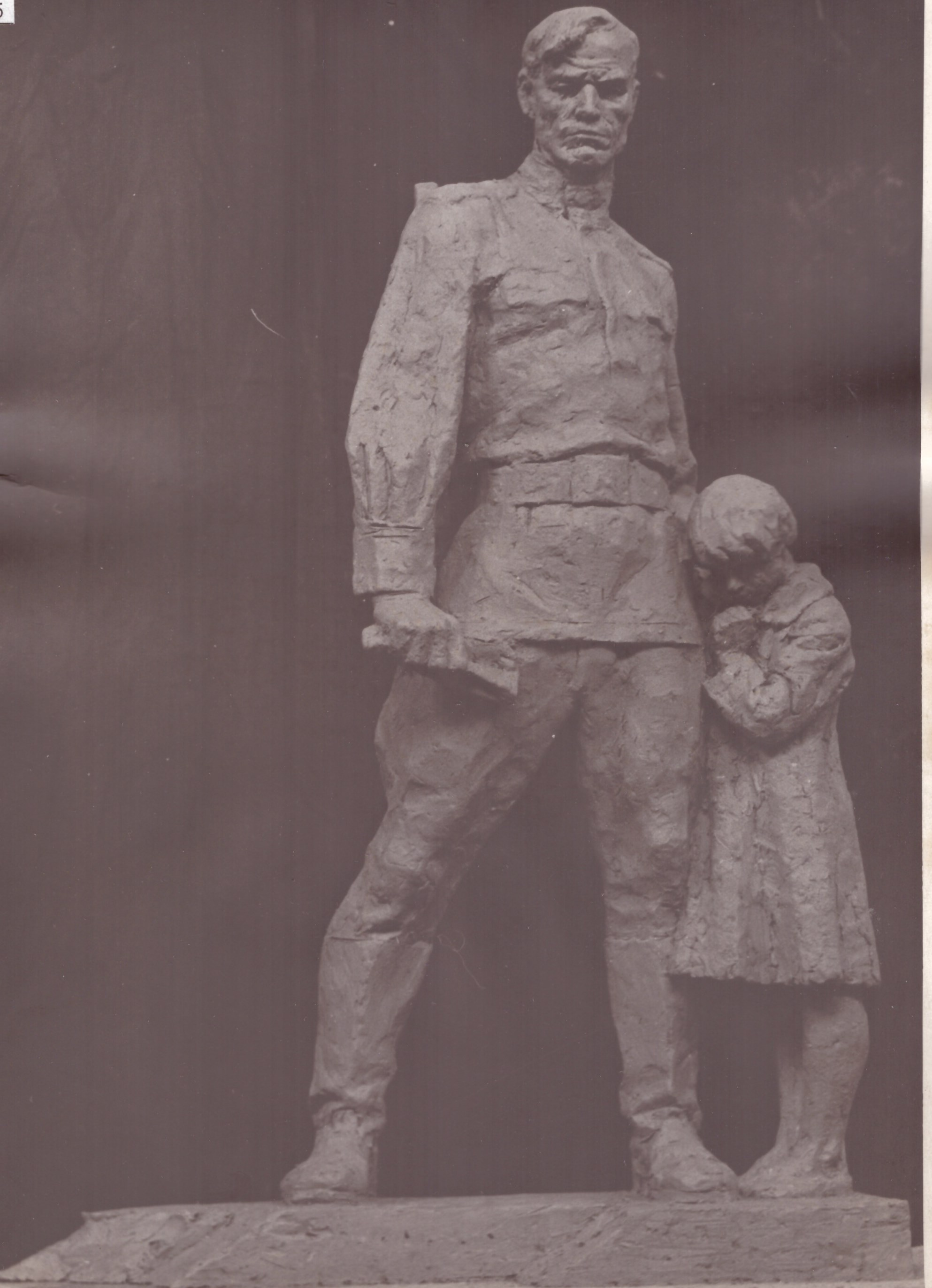 Пам’ятник загиблим воїнам-односельчанам в роки Великої Вітчизняної війни 1941-1945 р.р. С. Маркуші Бердичівський район Житомирська область. 1973. Скульптор Таранченко В.О., архітектор Марчук М.Г. Литий бетон.